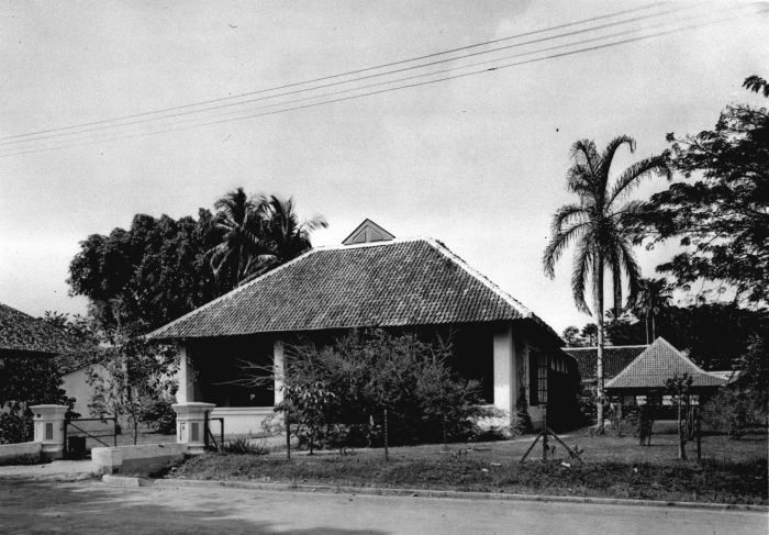 Foto. De school voor apothekers-assistenten (aan de?) Gang Kwini vanaf de straat gezien.